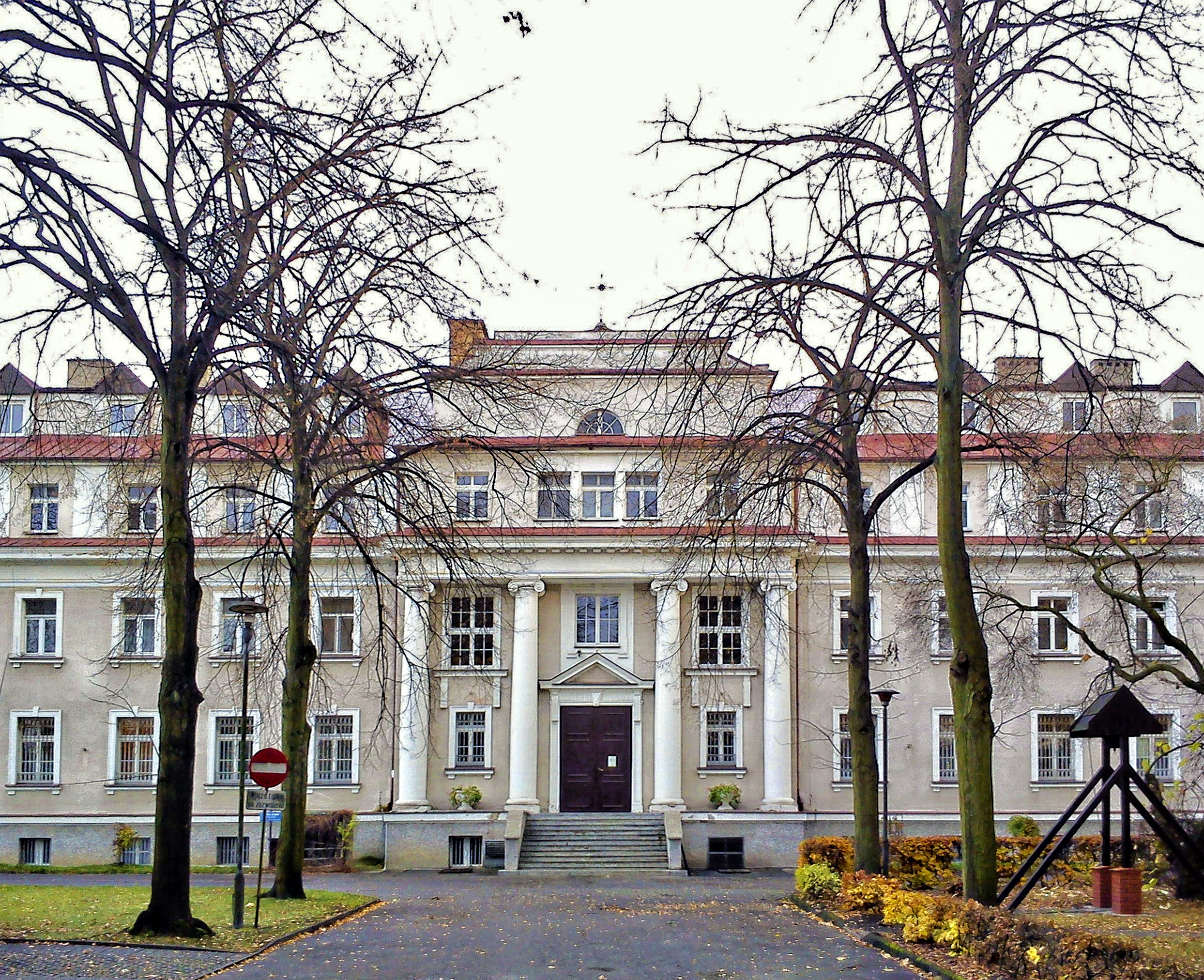 Poznań - Pokrzywno. Dom Urszulanek. Dawny nazistowski Centralny Instytut Badań nad Rakiem.